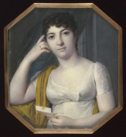 М-ль Жорж. 1800-1805. миниатюра. Мальмезон